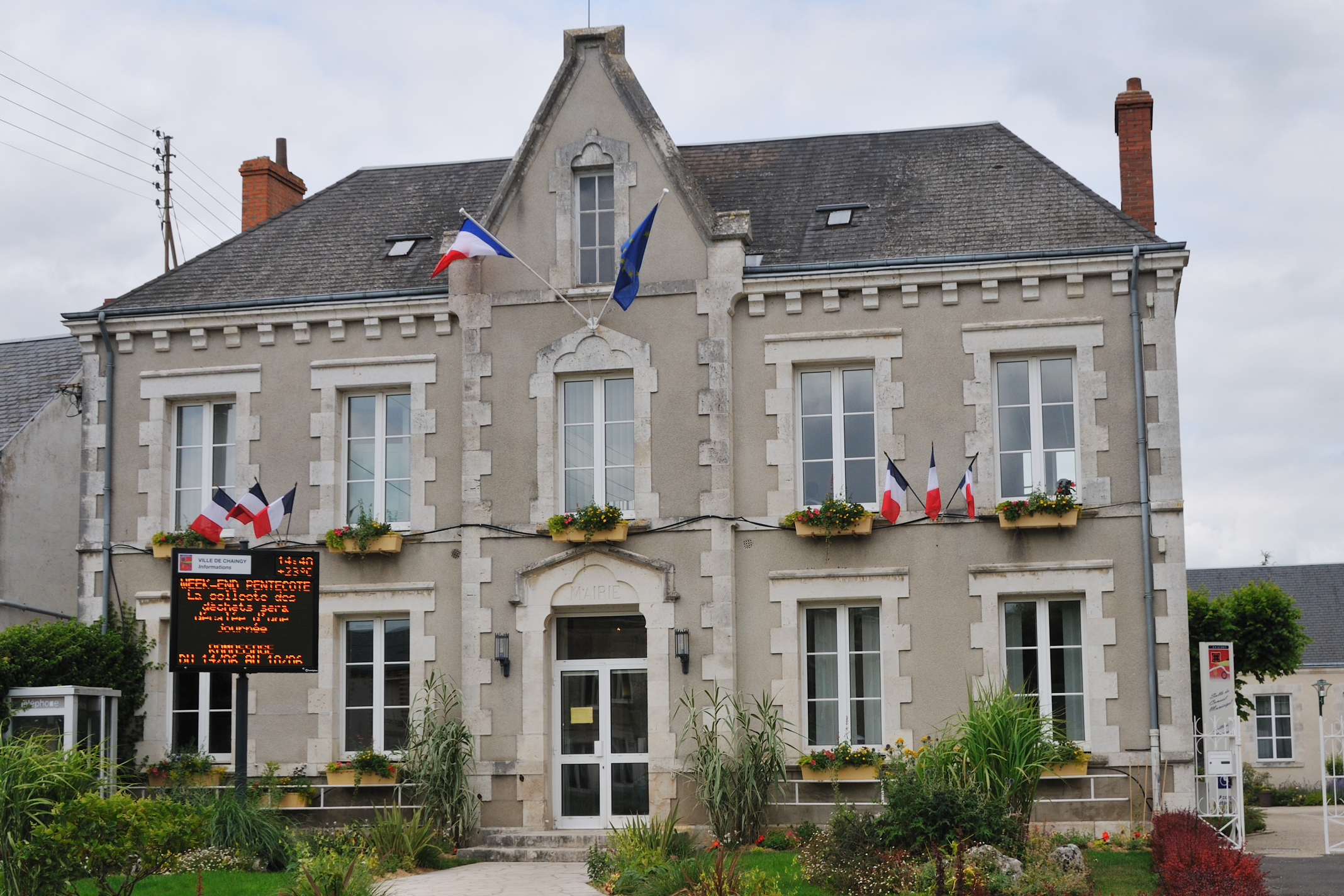 Mairie, Chaingy, Loiret, France